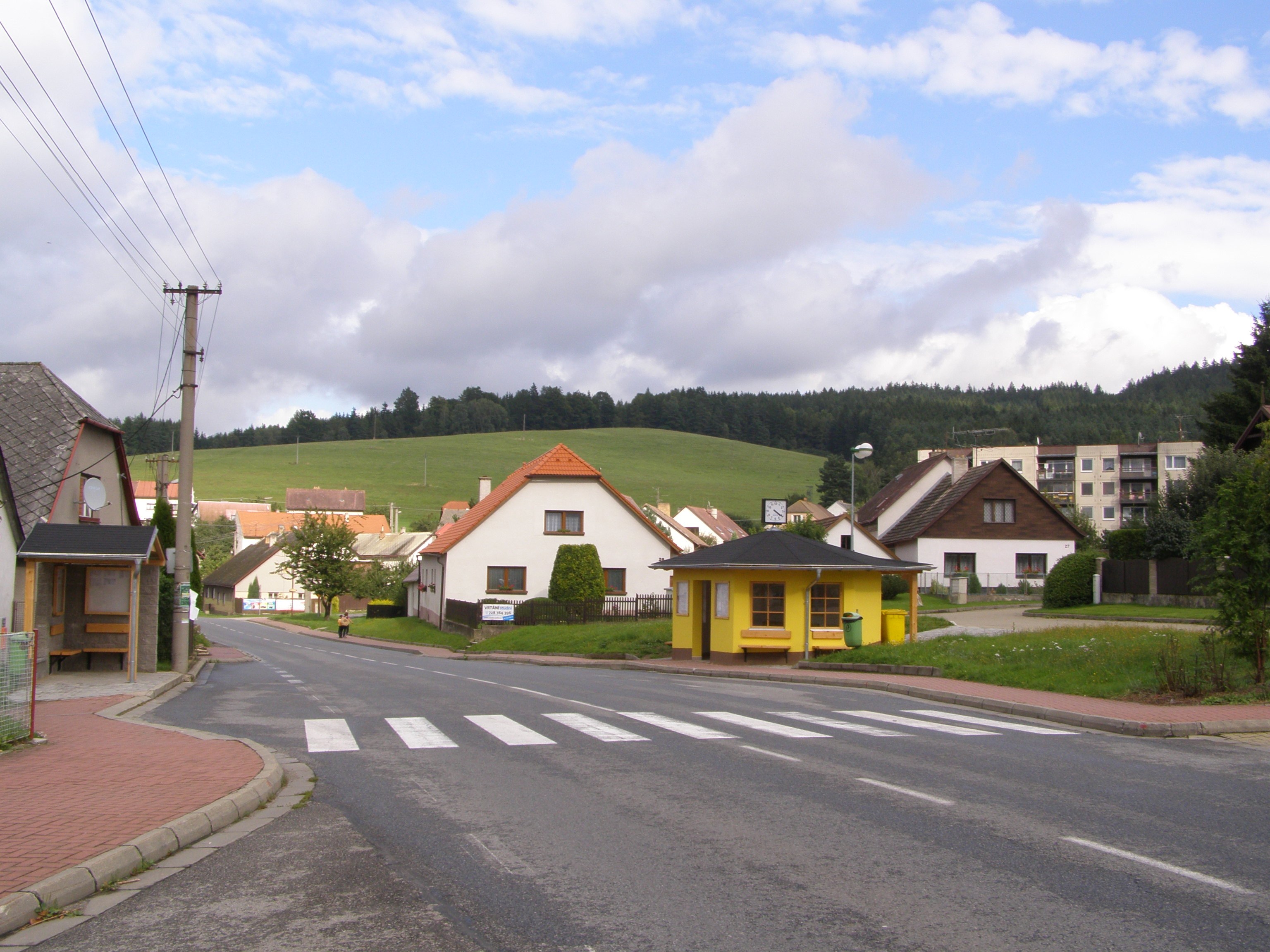 Česky: Kostelec, hlavní ulice (silnice Jihlava → Třešť / Horní Cerekev